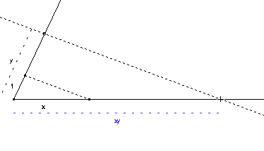 Construction d'un produit à la règle et au compas. Image personnelle. Licence GFDL. Utilisateur:HB